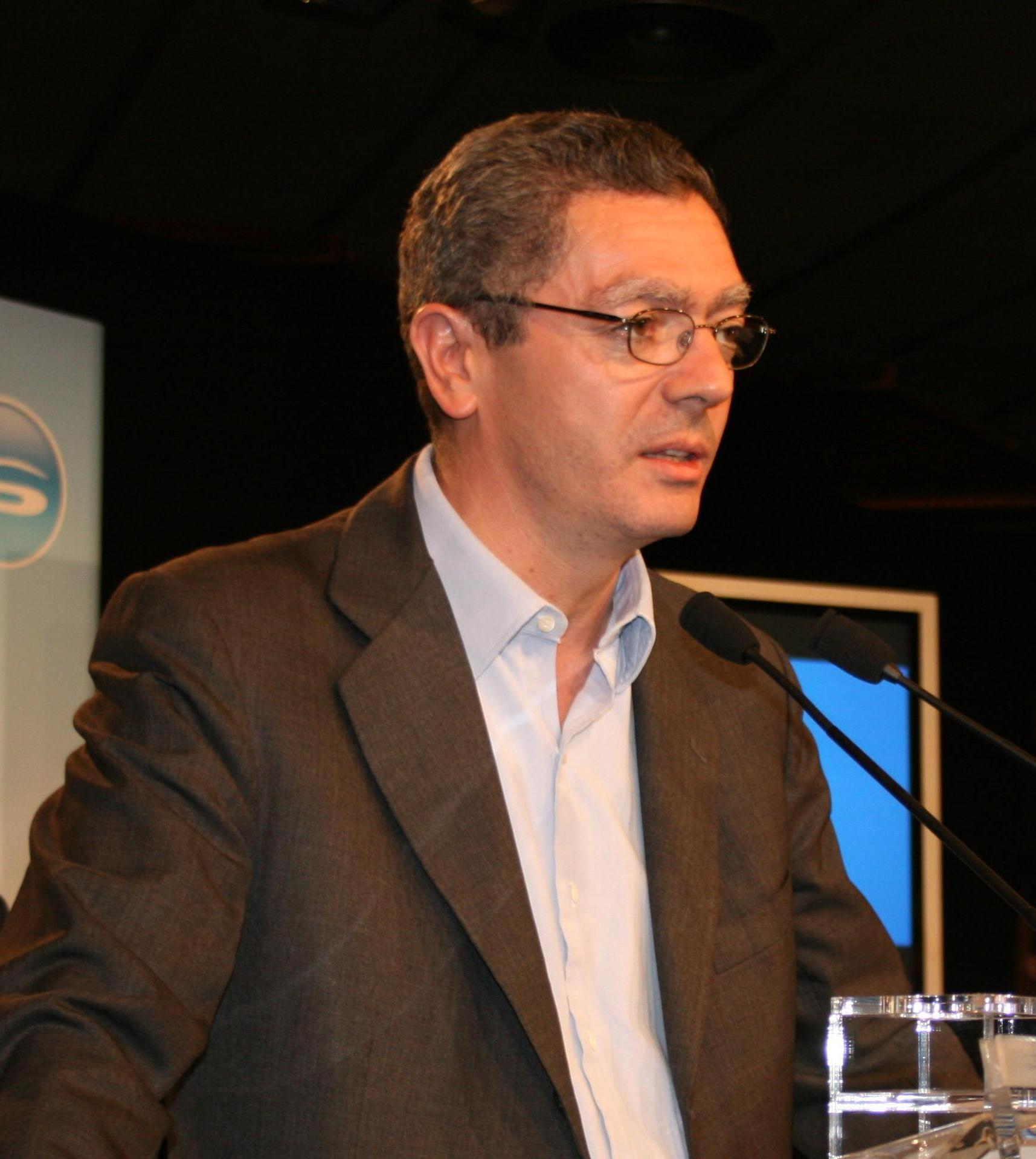 Alberto Ruiz-Gallardón en el inicio de campaña de las Elecciones Generales 2008.